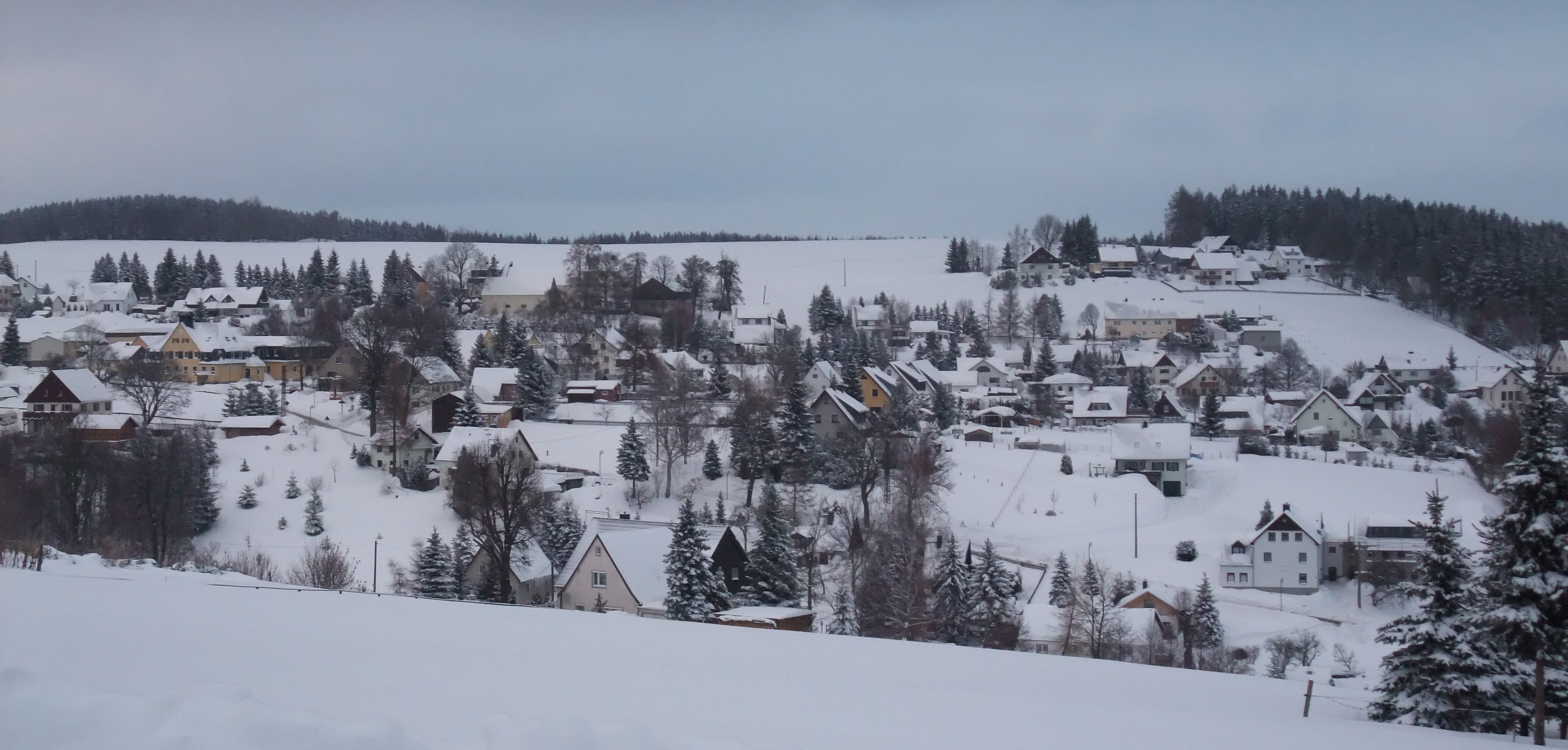 Niederlauterstein im Erzgebirge: Schloßberg, Gänsegasse und Neue Siedlung von der Marienberger Straße gesehen.